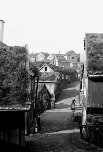 Bringsnagøta, Tórshavn, Faroe Islands